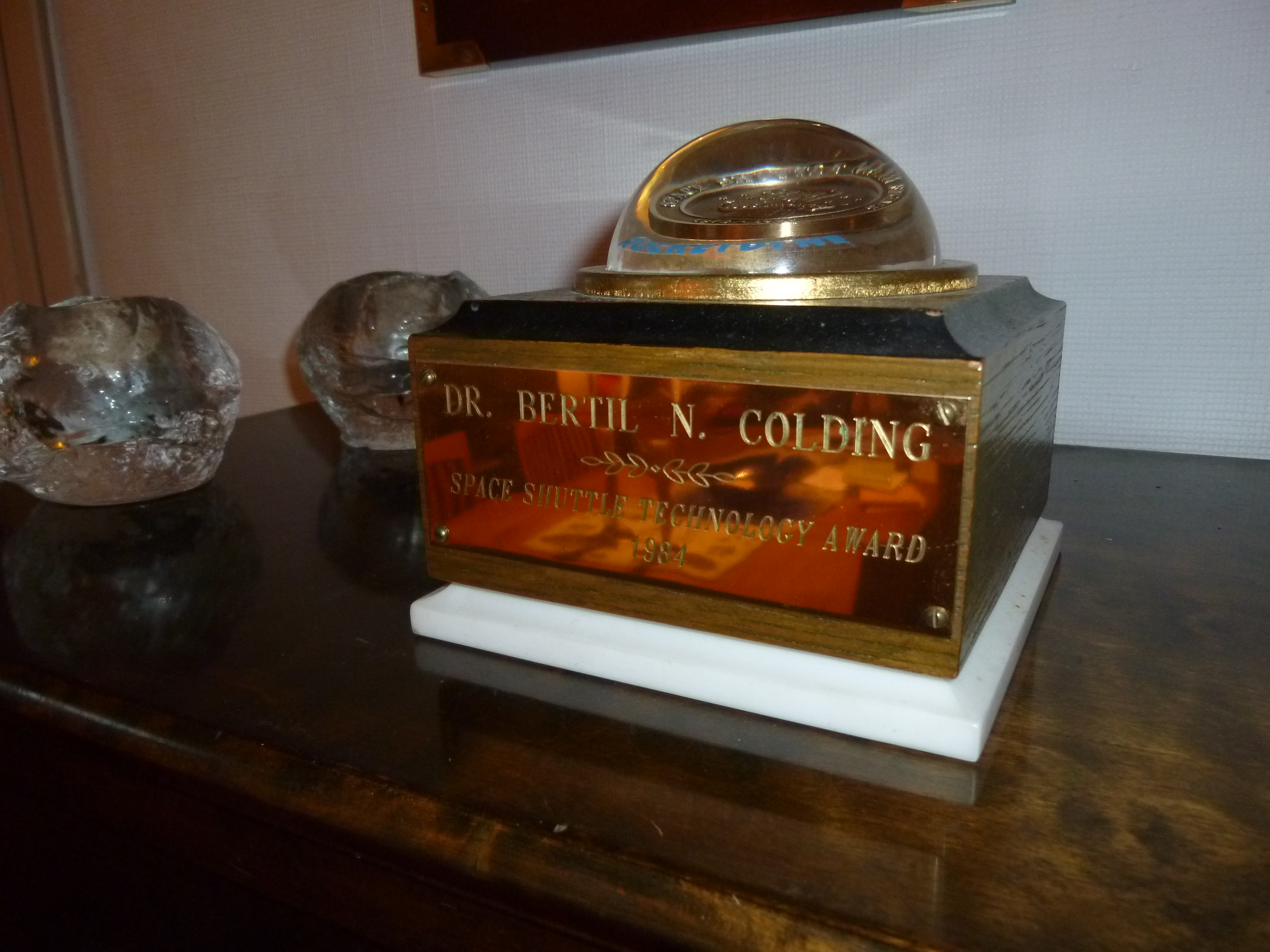 Space Shuttle Award 1984, Space Shuttle Main Engines 1000 Firings Bertil Colding